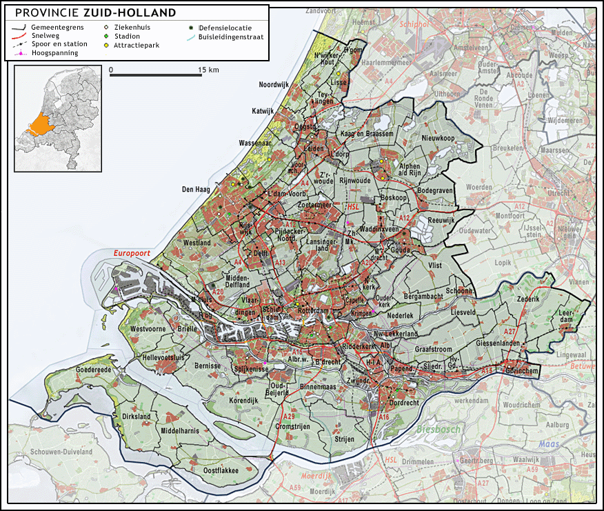 Provincie Zuid-Holland, met indeling van gemeenten (2009) en impressie van het landschap.